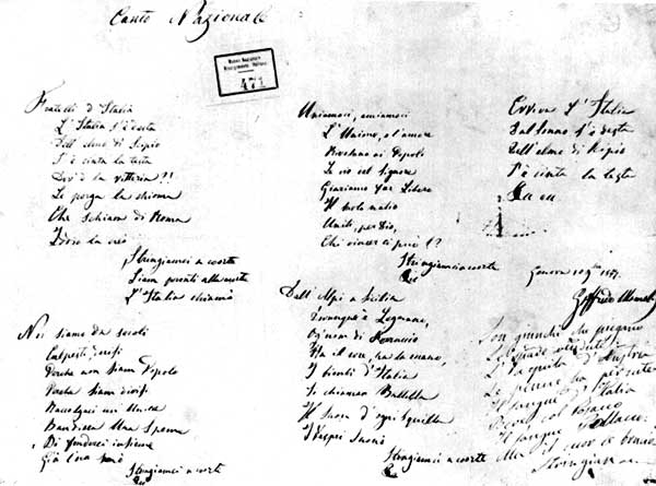 Canto degli italiani, Inno di Mameli, Inno nazionale italiano. L'autografo dei versi dell'Inno di Mameli – Italian National Anthem "Inno di Mameli". (Testo autografo.)